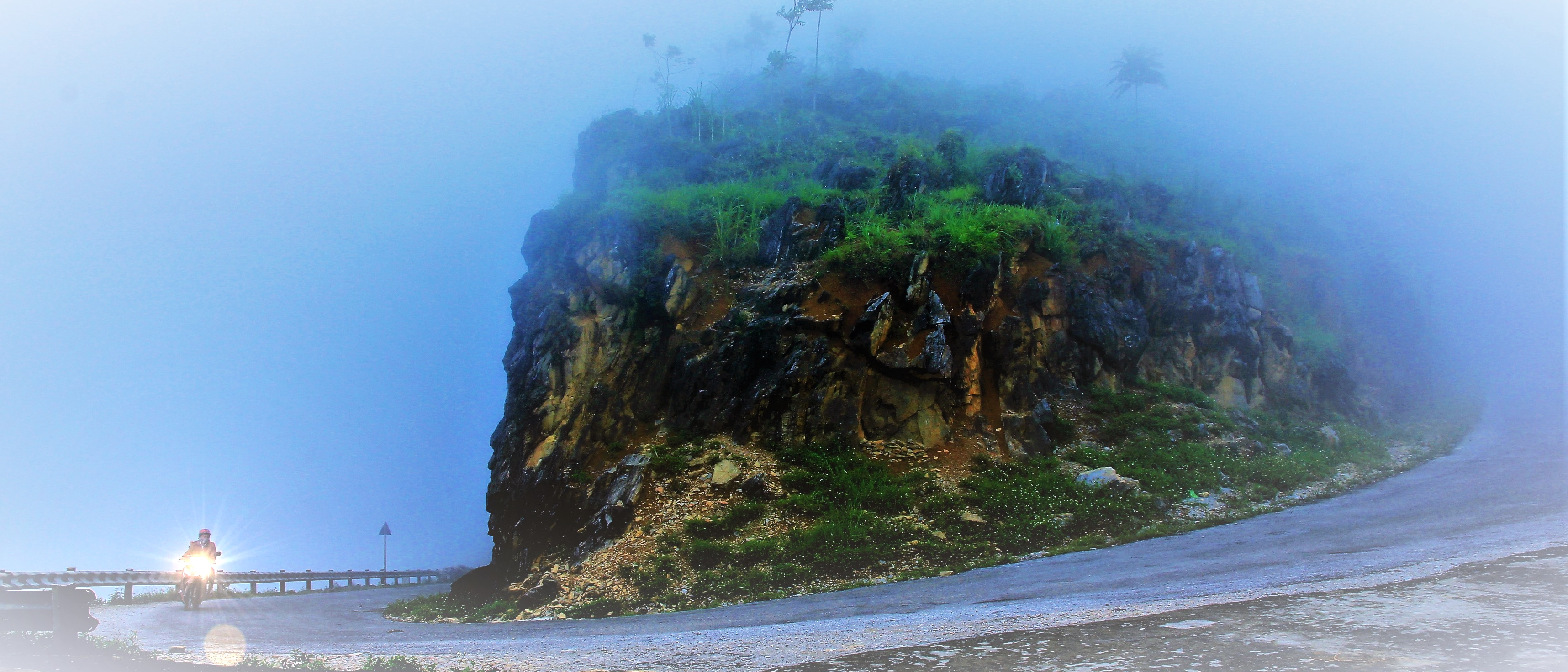 Trạm quan sát trên đêò Mã Pì Lèng